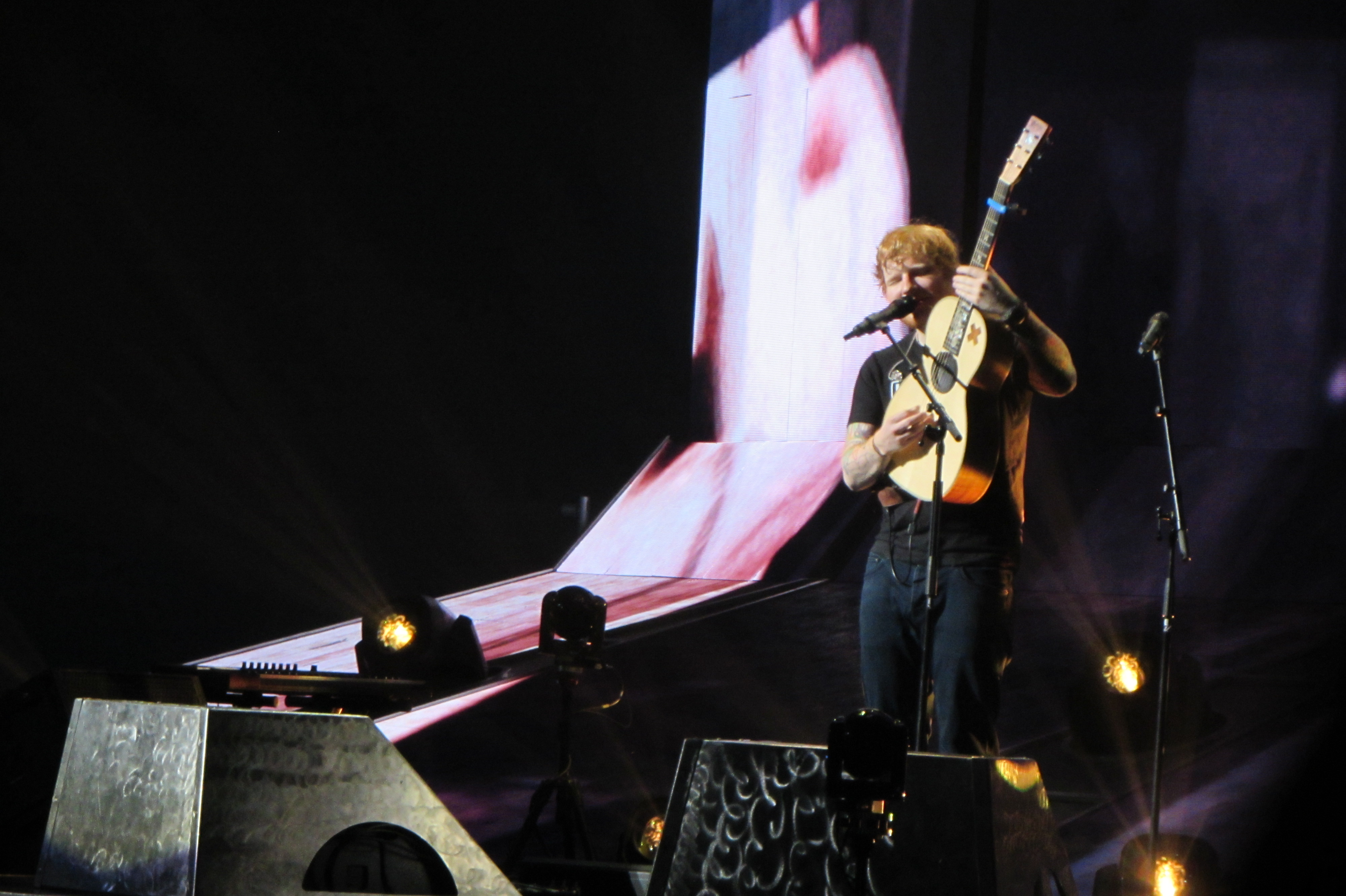 אד שירן בהופעה בניו יורק, 2017